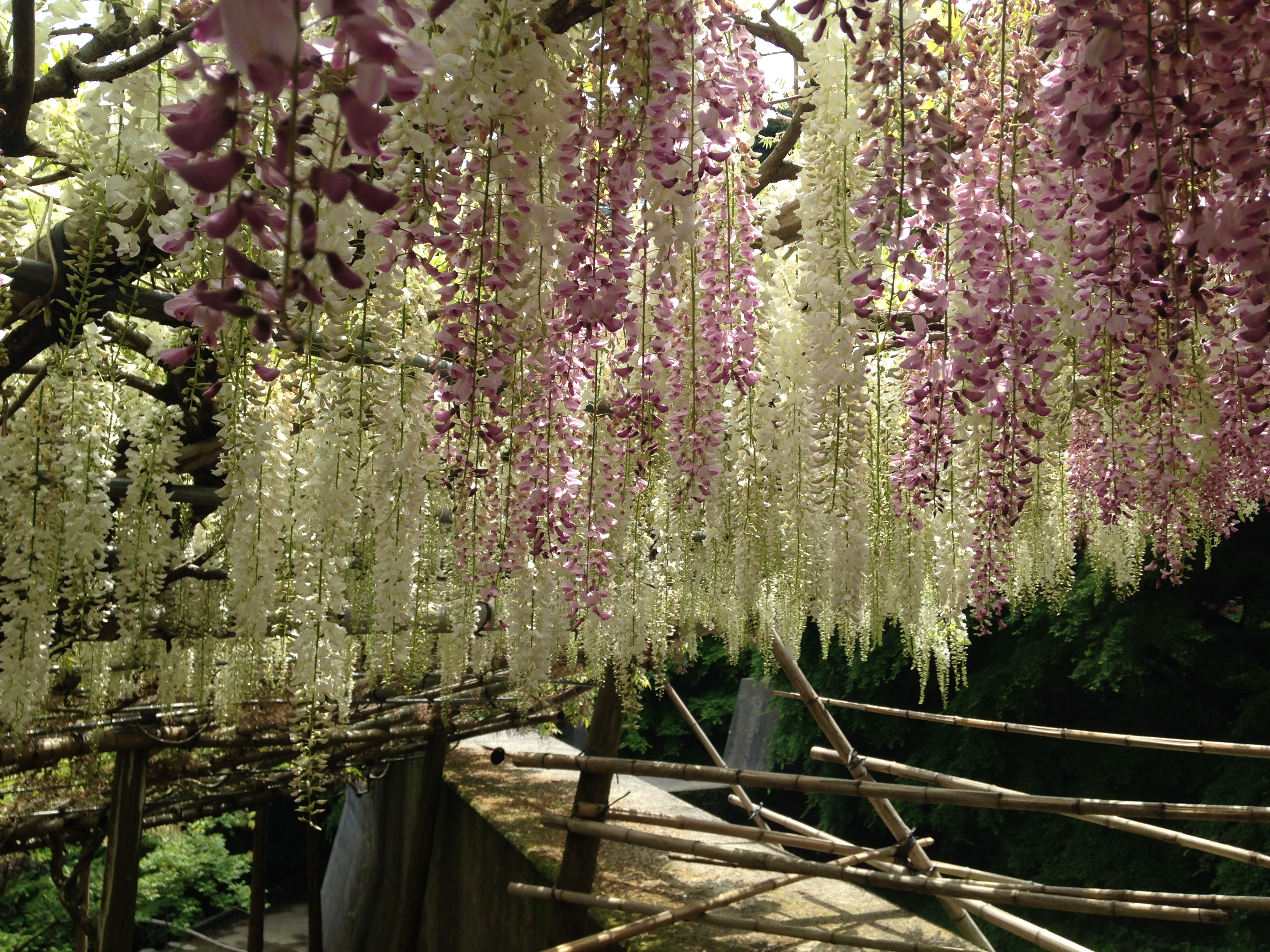 河内藤園のフジ